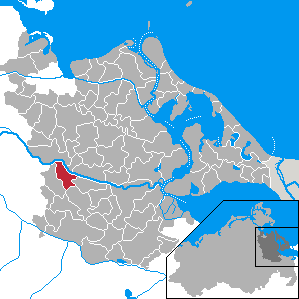 Liepen, Landkreis Ostvorpommern, Mecklenburg-Vorpommern